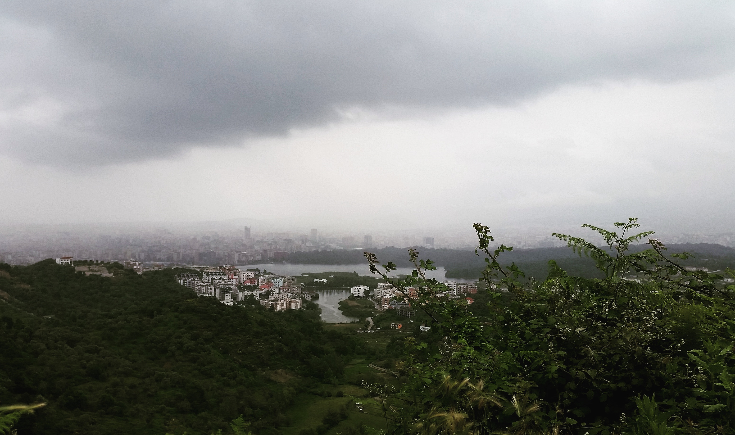 Parku I Madh I Tiranes